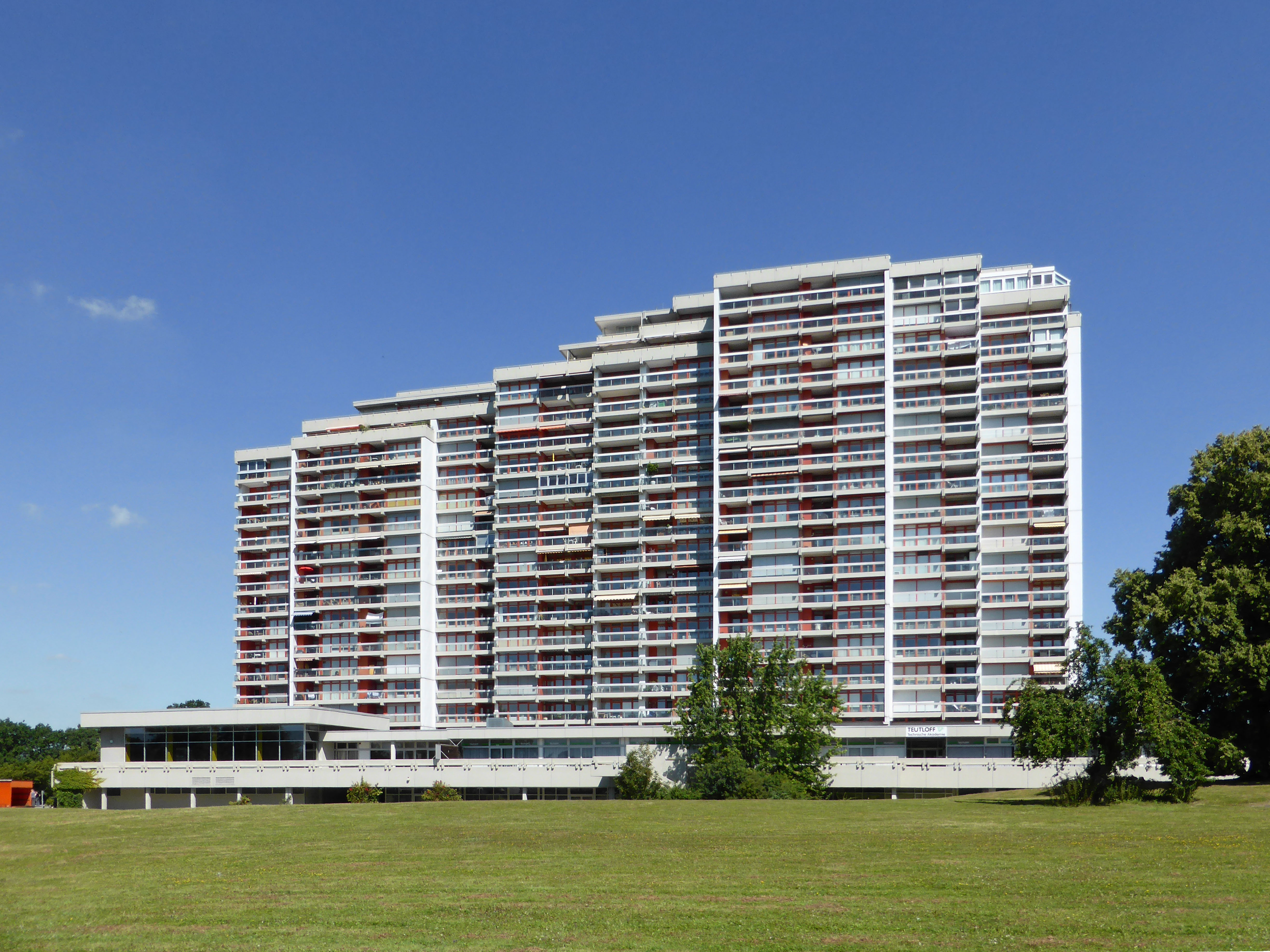 Schillerteich-Center in Wolfsburg.